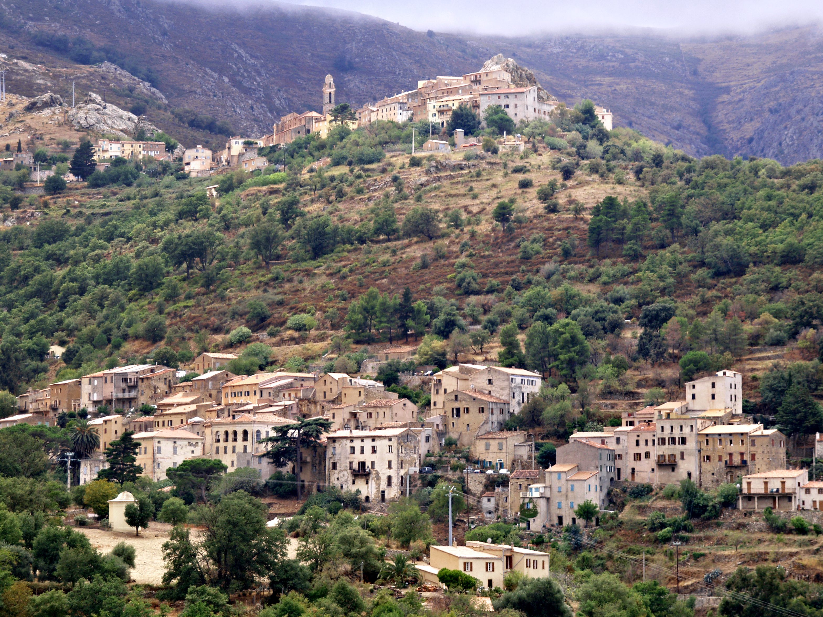 Ville-di-Paraso, Balagne (Corse) - Vue du village dominé par celui de Speloncato